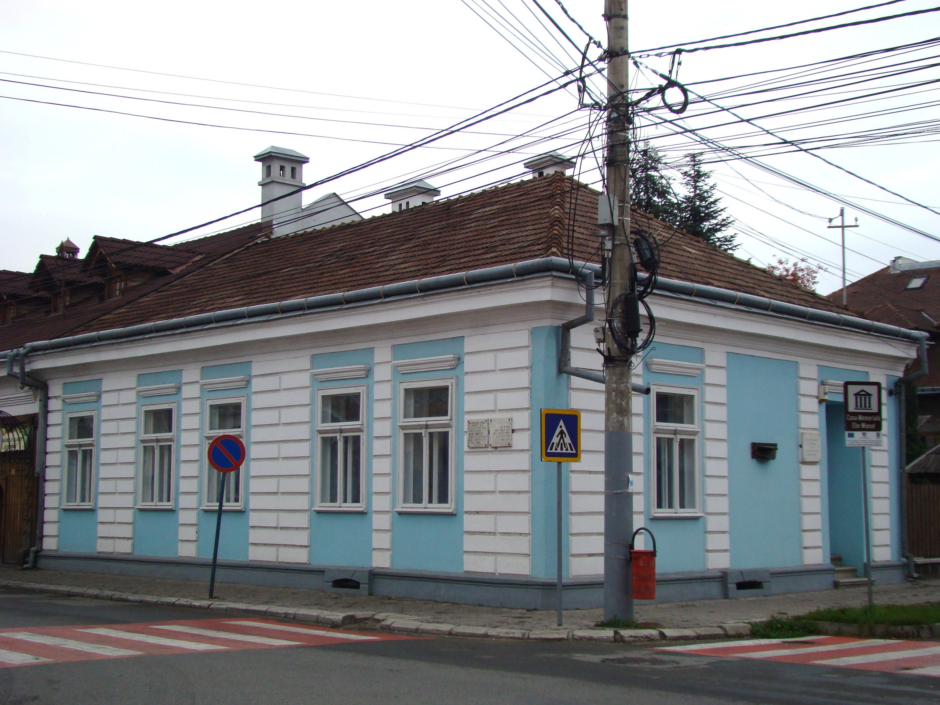 Casa Elie Wiesel, Str. Vladimirescu Tudor 1, municipiul Sighetu Marmației